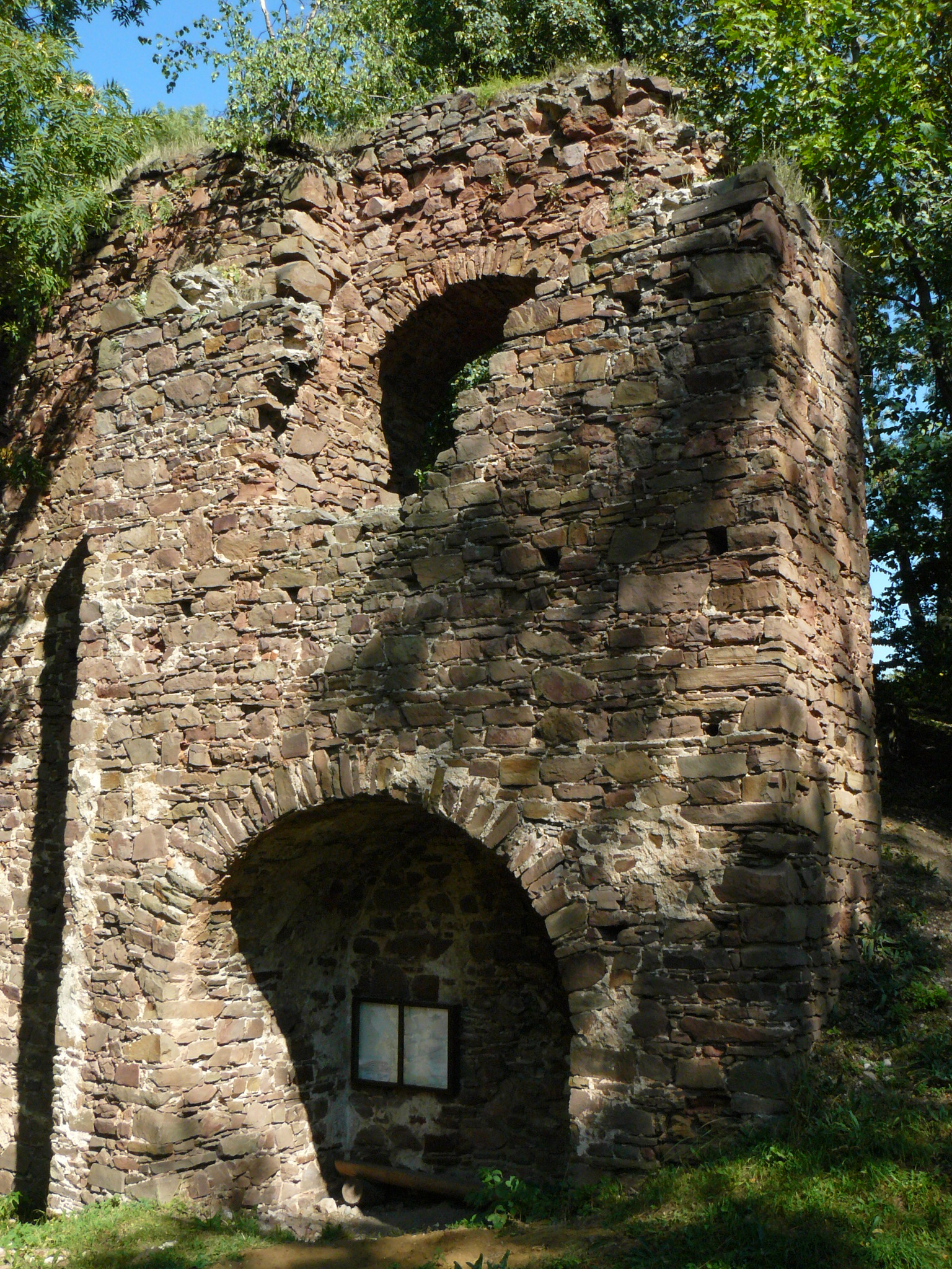 Zřícenina hradu Fulštejn, Bohušov, okres Bruntál, Slezsko